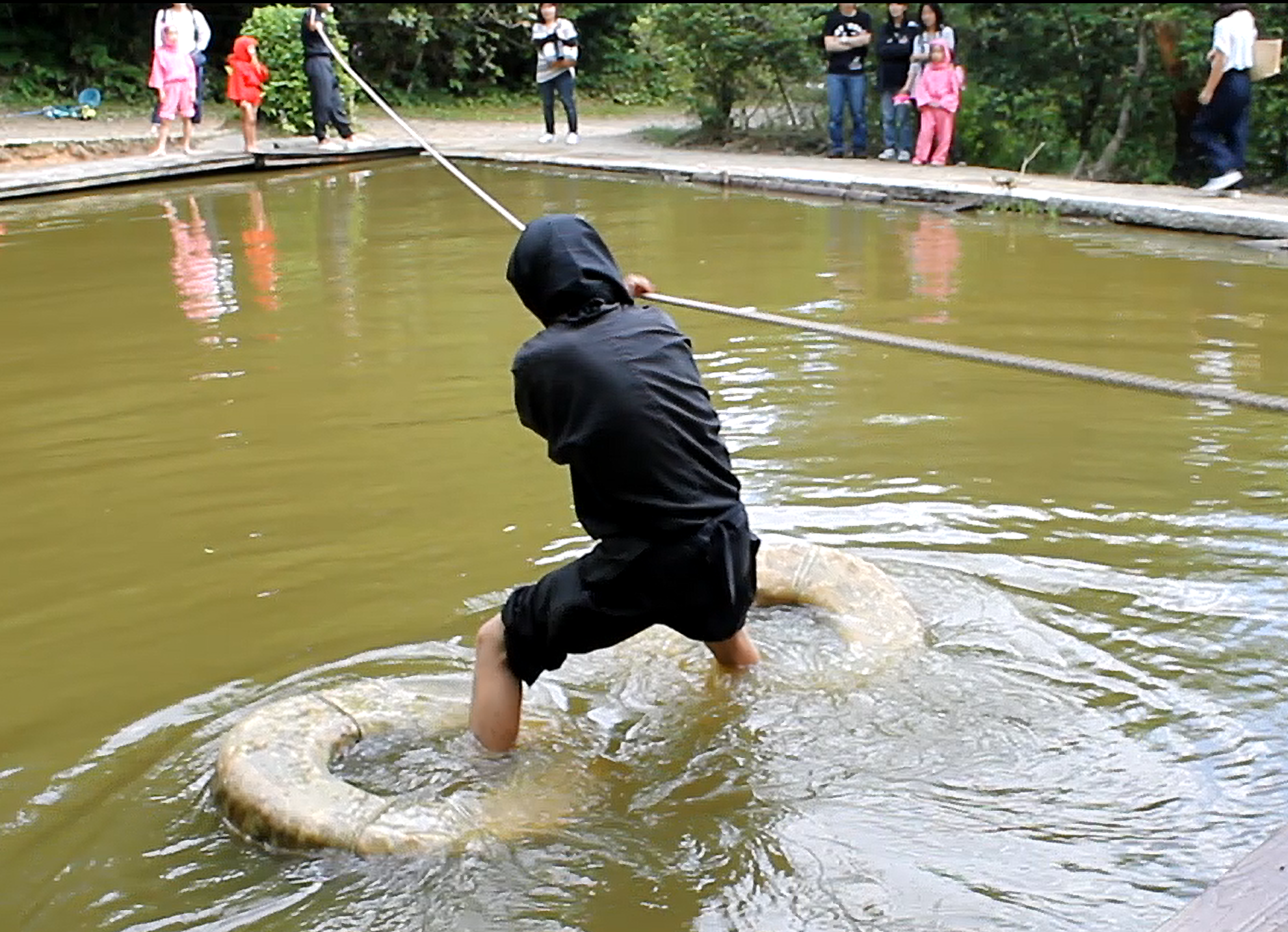 Personne participant à l'araignée d'eau